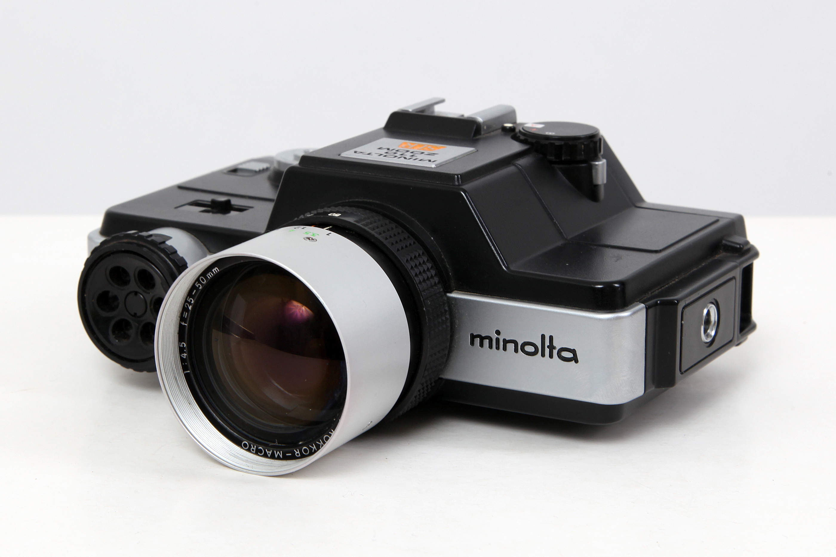 Fotoapparat Minolta 110 Zoom SLR